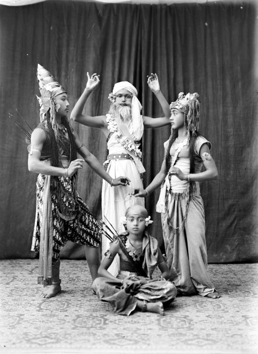 Negatief. Toneelspelers uit het drama Sakuntala